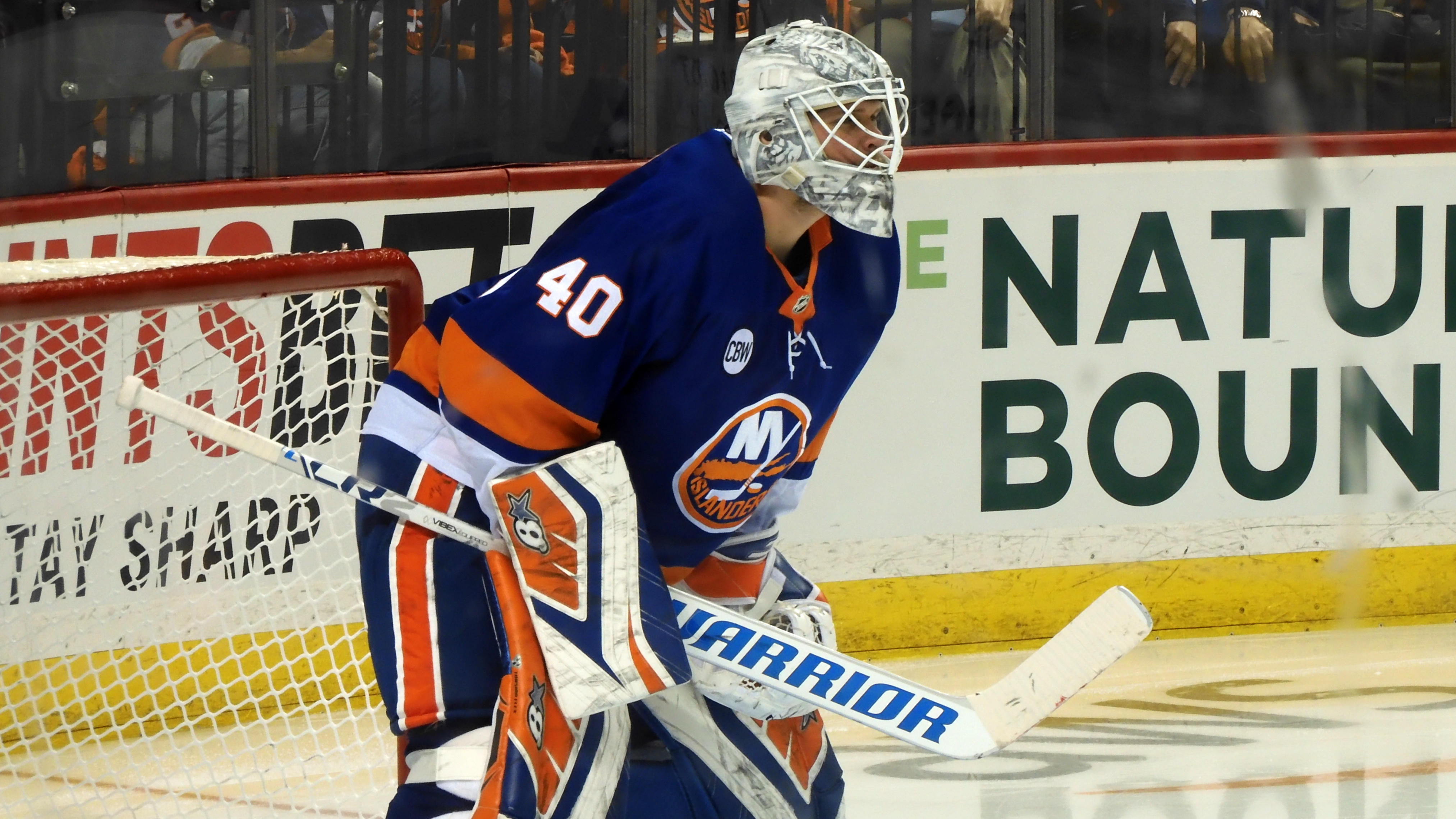 Islanders Goalie Robin Lehner